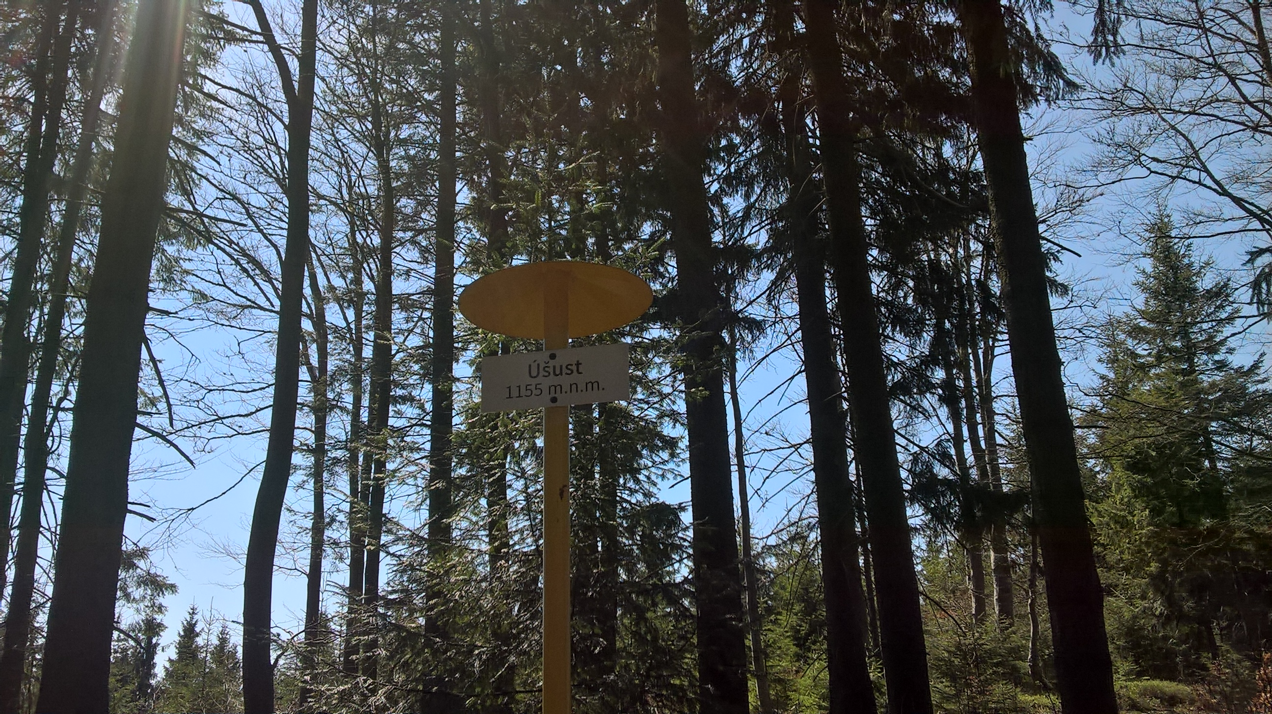 Zalesiony szczyt Oszusa 1155 m n.p.m.